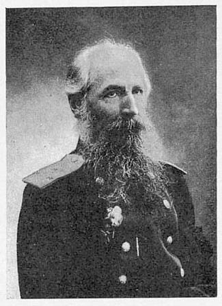 генерал Кирпичёв, Константин Львович